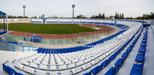 Центральный (стадион, Астрахань)